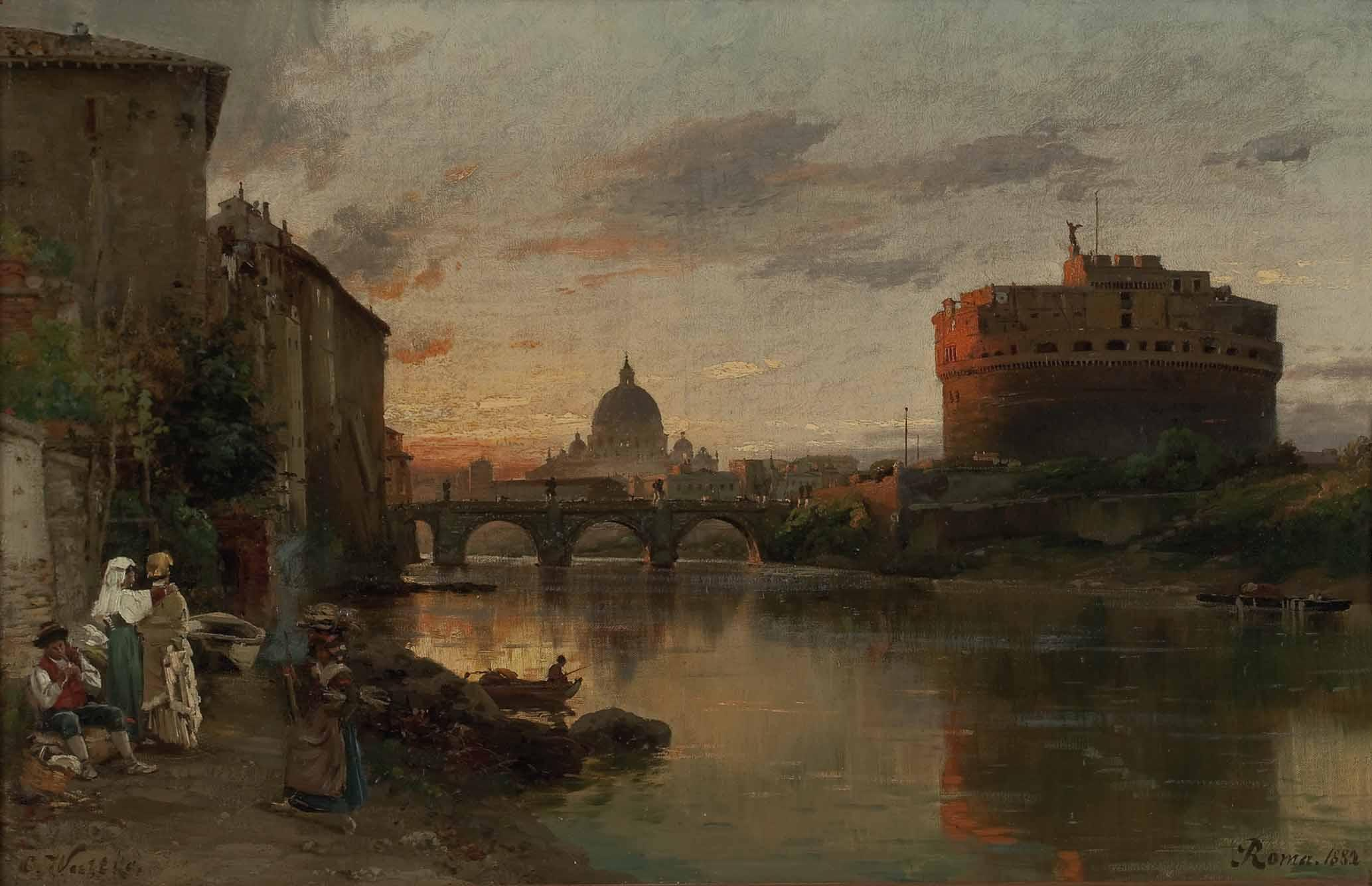 Veduta di Roma - Abendstimmung am Tiber mit Engelsburg und im Hintergrund der Petersdom